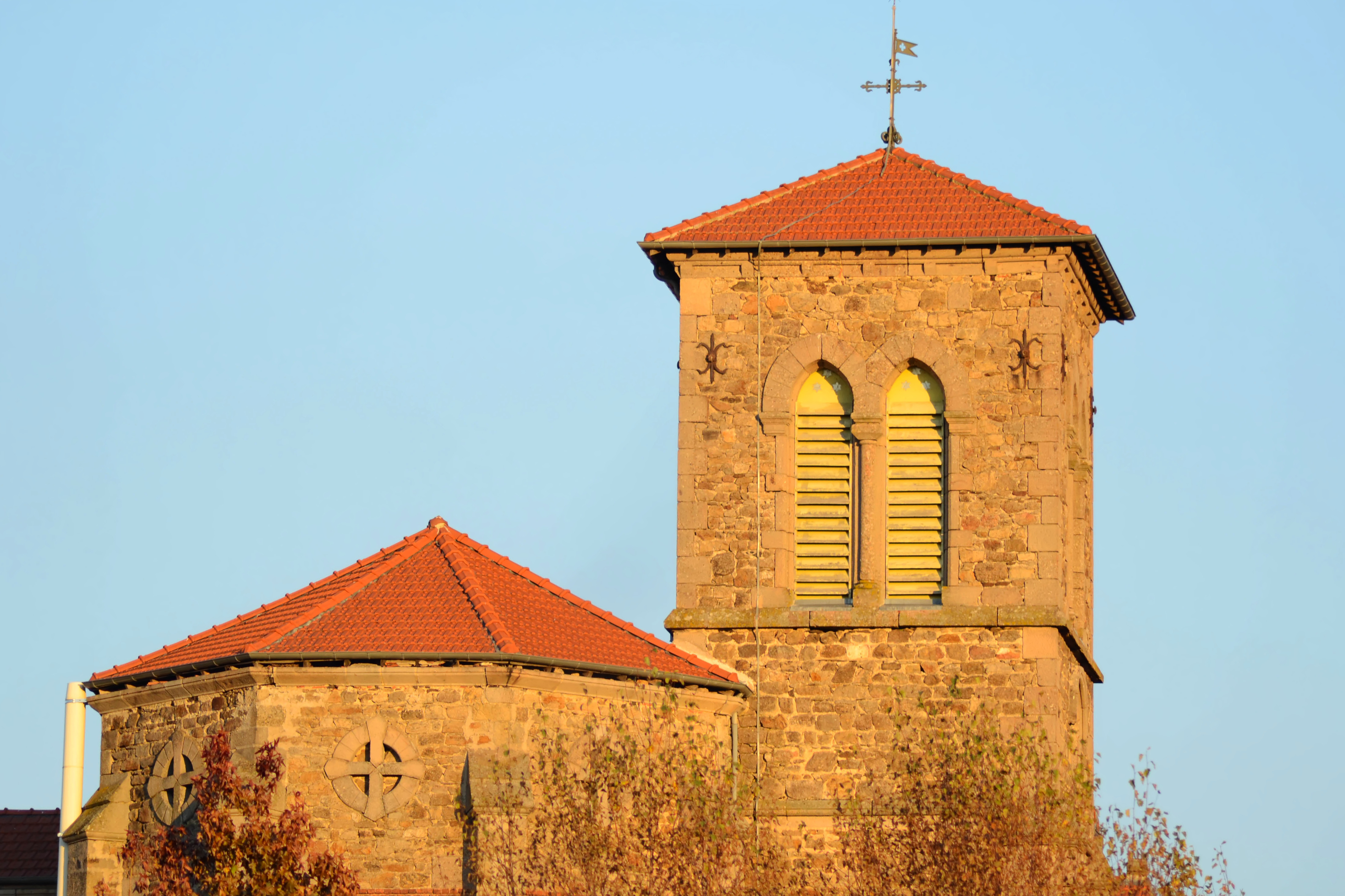 Eglise de Saint-Ferréol d'Auroure, Haute-Loire